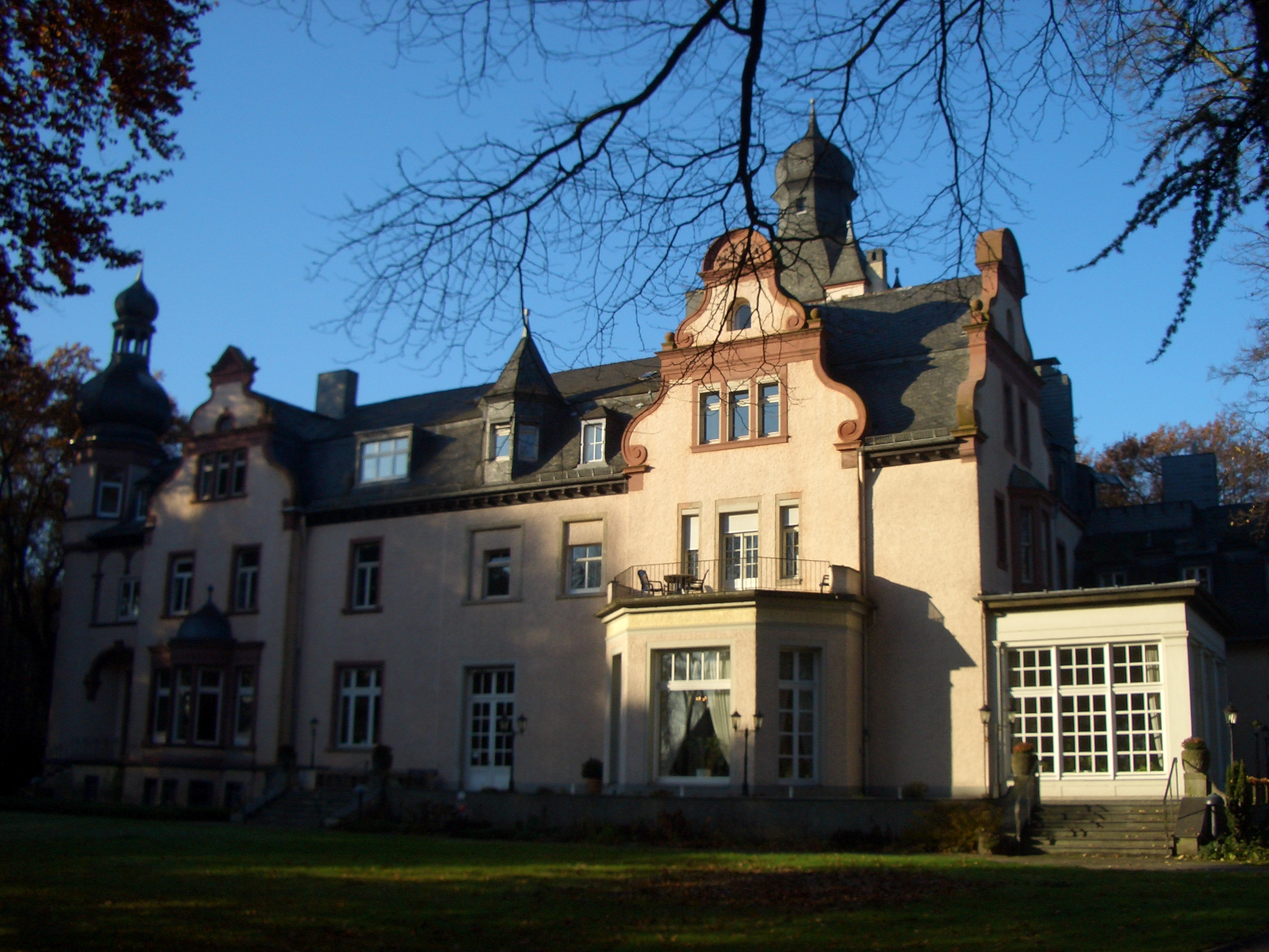 Schloss Eichholz (Wesseling/Urfeld) von der Parkseite